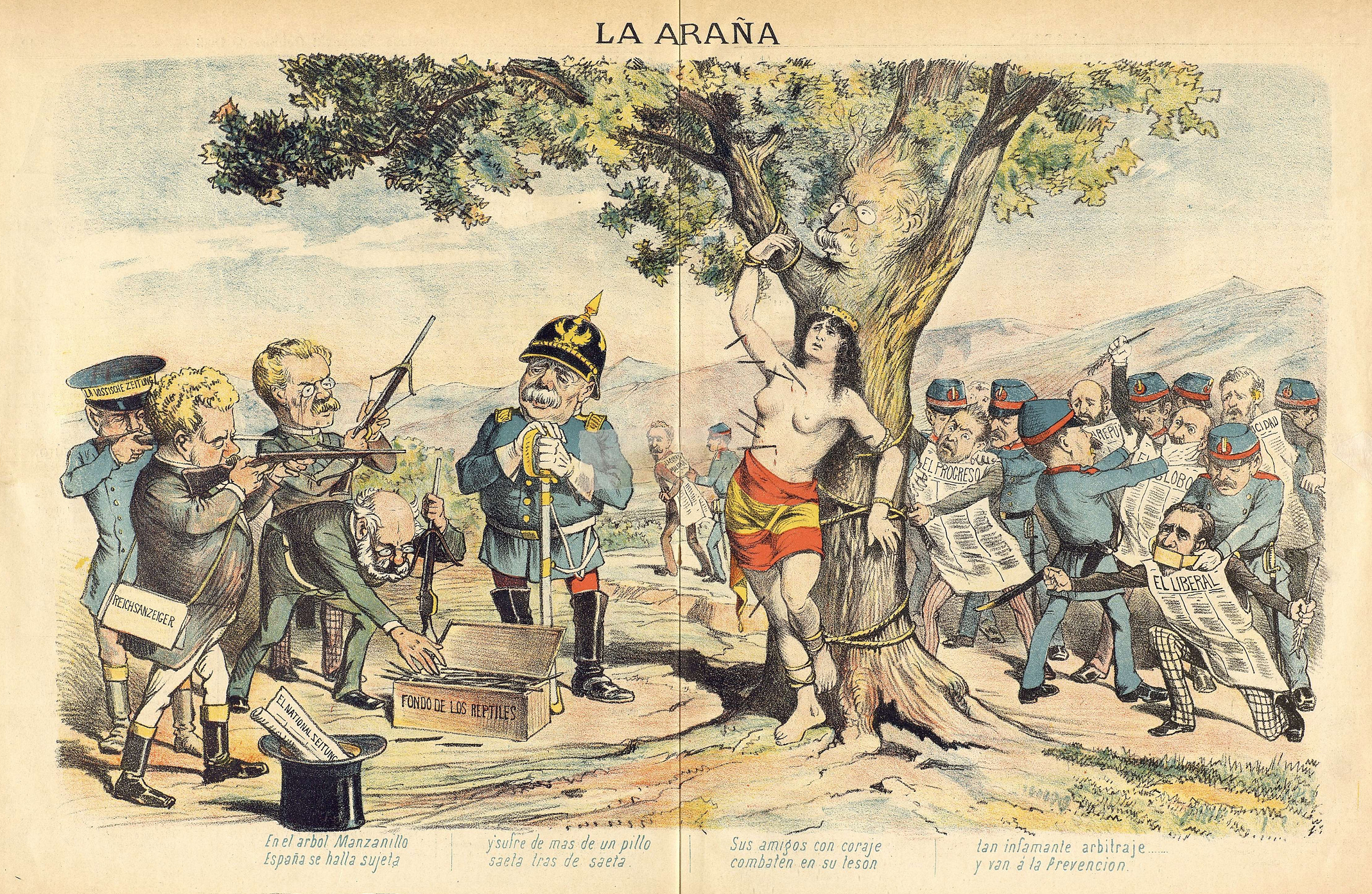 Caricatura publicada en la revista satírica La Araña.